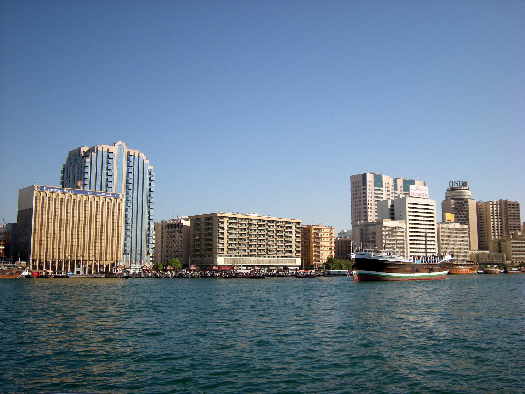 Dubai Creek - 1